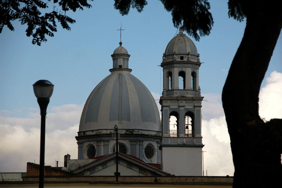 Capilla del Calvario en Orizaba, Veracruz.